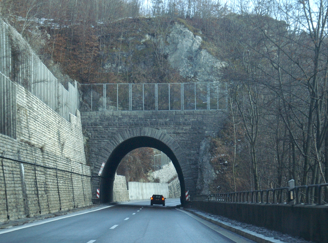 Der Nasenfelstunnel am Drackensteiner Hang